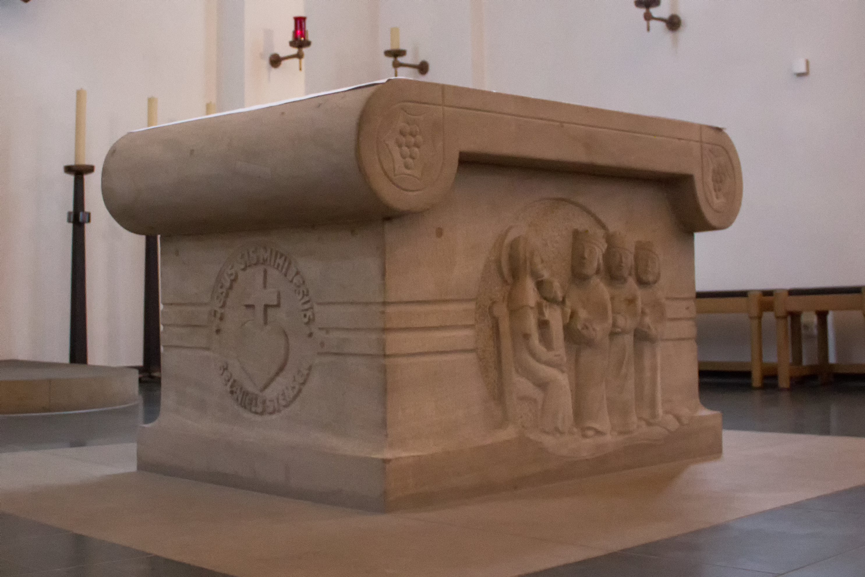 Altar der St. Joseph-Pfarrkirche in Paderborn-Marienloh